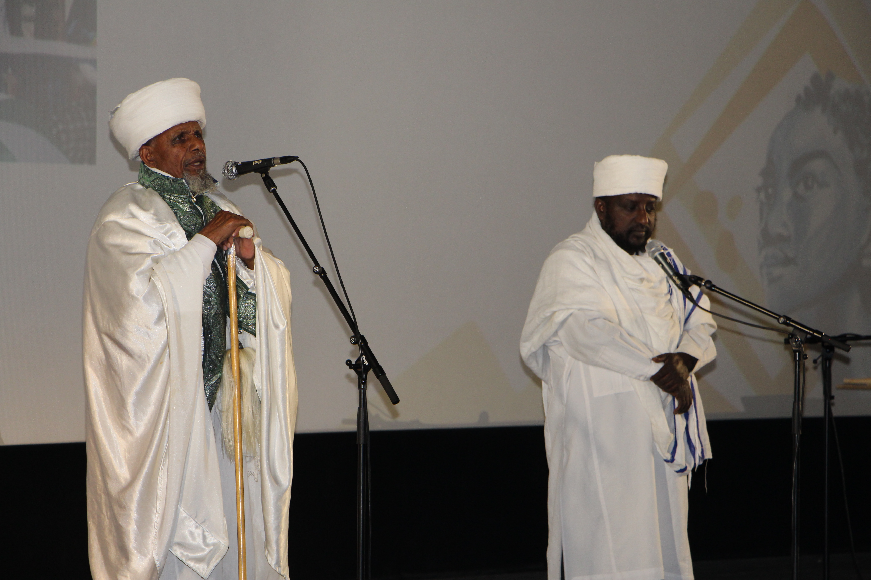 קסים נושאים תפילה בכנס השלישי של פורום ירוסלם, שנערך בסינמטק תל אביב